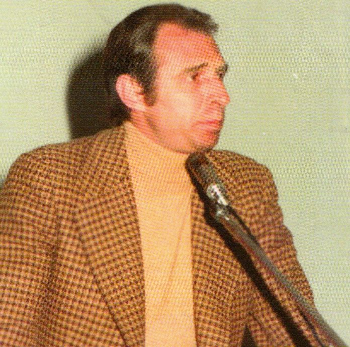 Anton Borrell al Pavelló de Fires de Reus en un míting del PSC l'abril de 1977